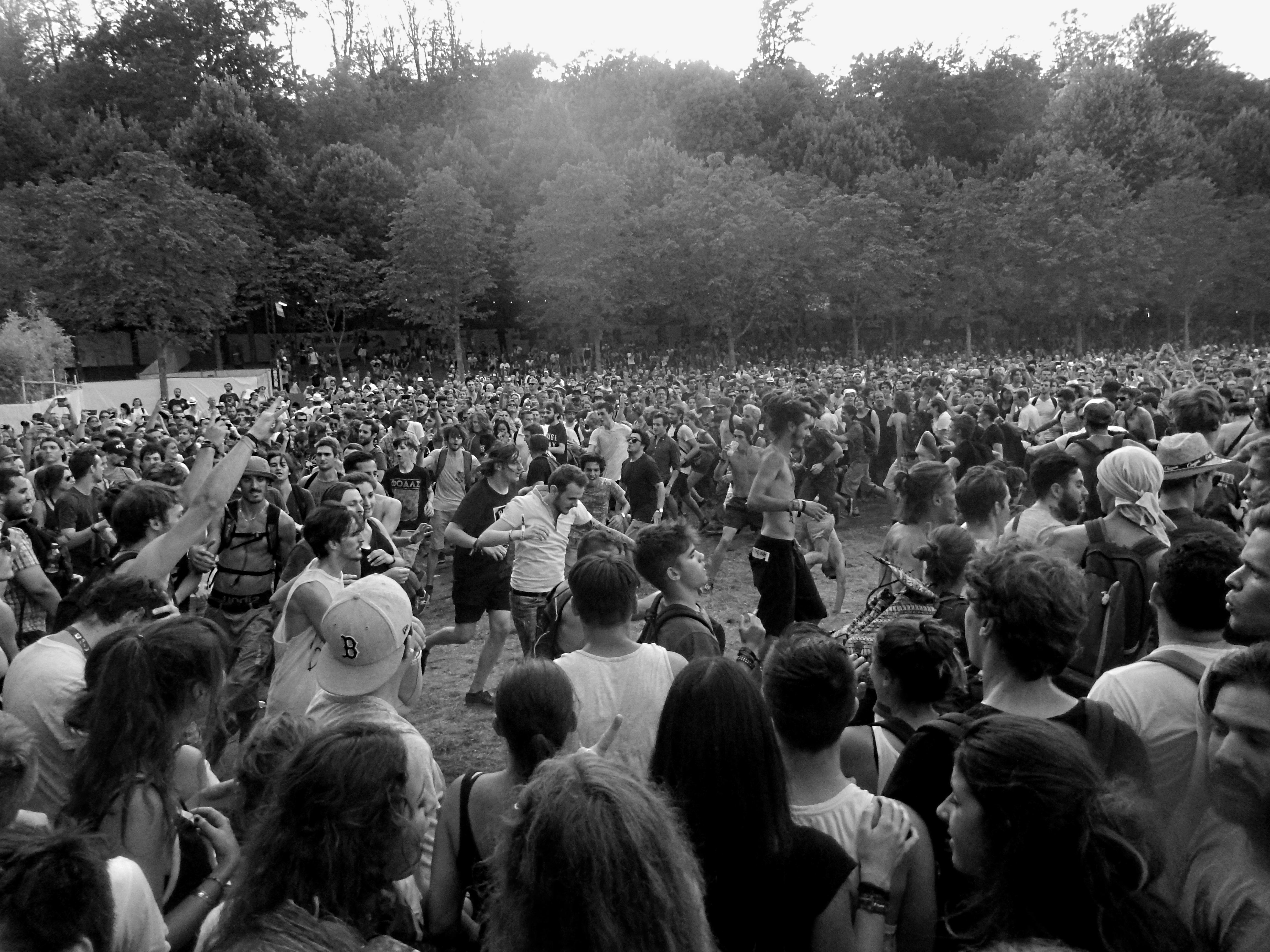 Bring Me The Horizon Mosh Pit, Rock en Seine 2016, Paris